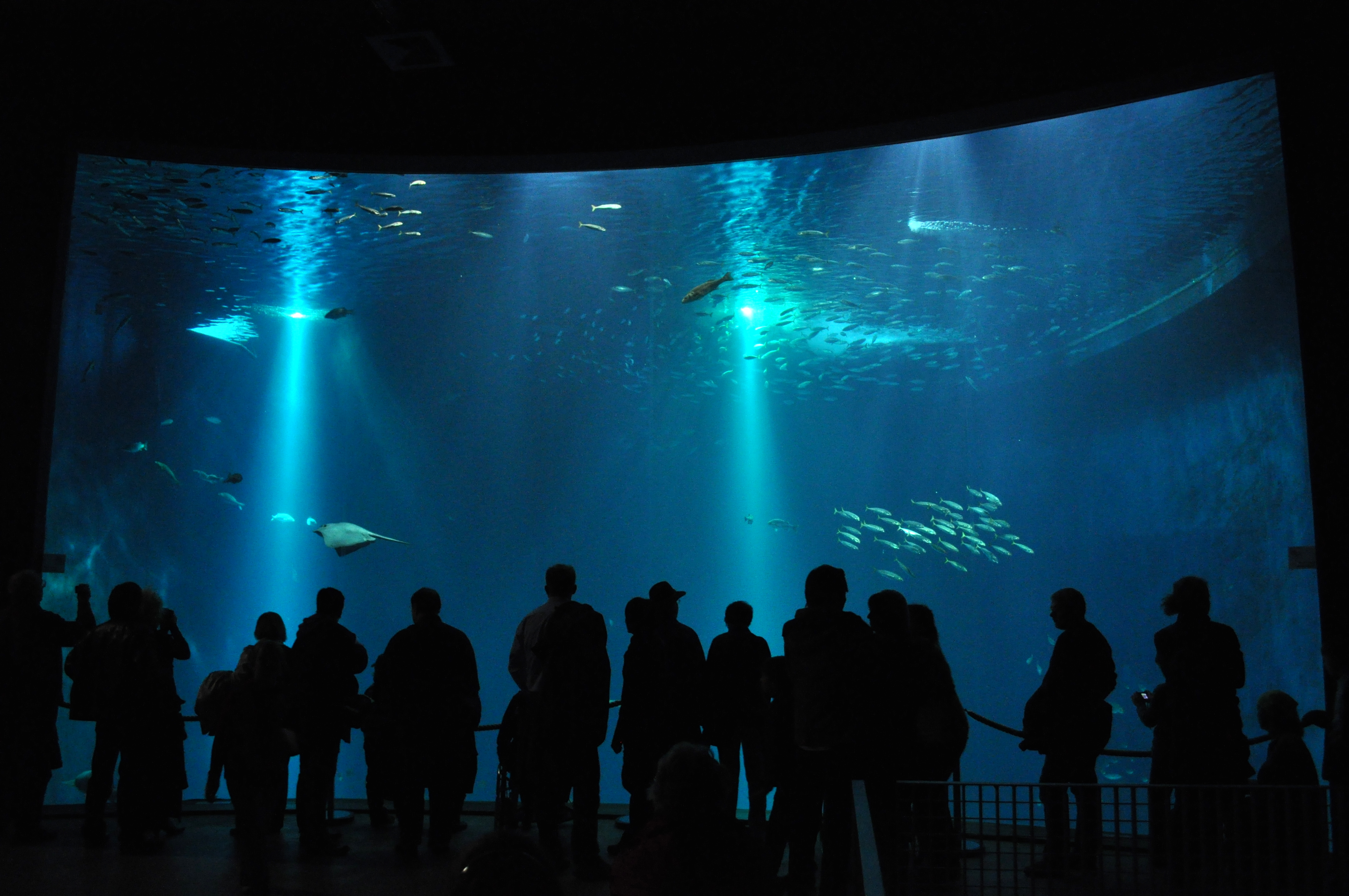 Ein Aquarium im Ozeaneum Stralsund: Offener Atlantik.